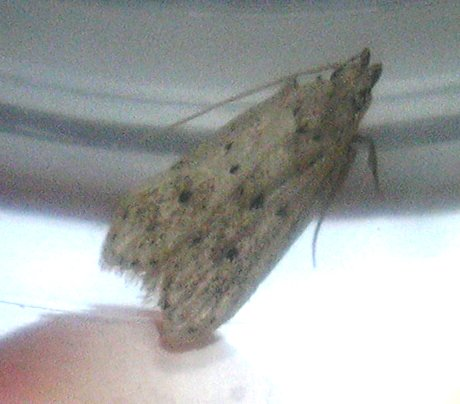 Autosticha pelodes (Autosticha gelechid moth) in vial. Kahului, Maui, Hawai'i.